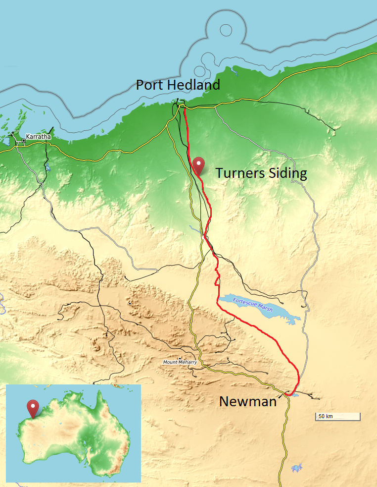 Topografische Karte der Eisenbahnstrecke zwischen Newman und Port Hedland, mit Position des Eisenbahnunfalls. Bildquelle